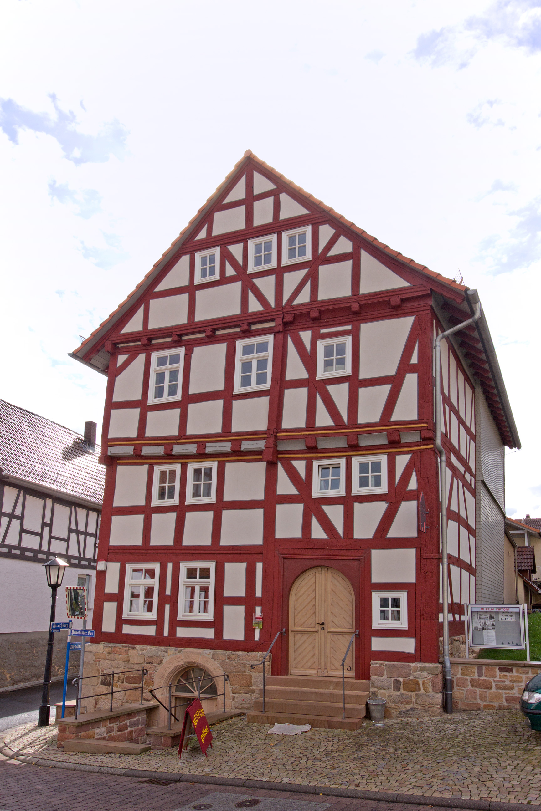 Museum in Kirtorf im Vogelsberg.